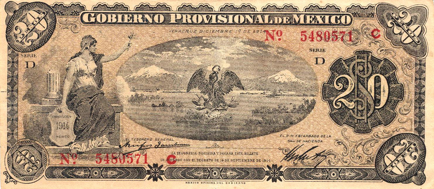 Billete de 20 pesos del Gobierno Provisional de México emitido en 1914.